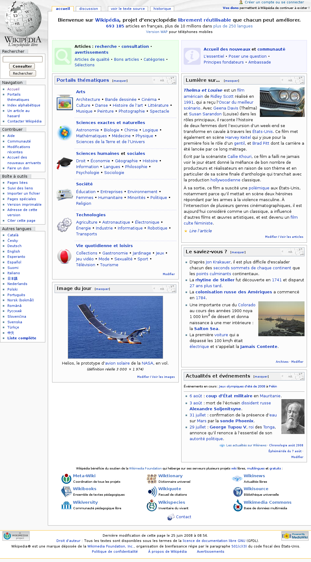 La page d'accueilde Wikipédia (représentée intégralement) telle qu'elle apparaissait le 7 Août 2008